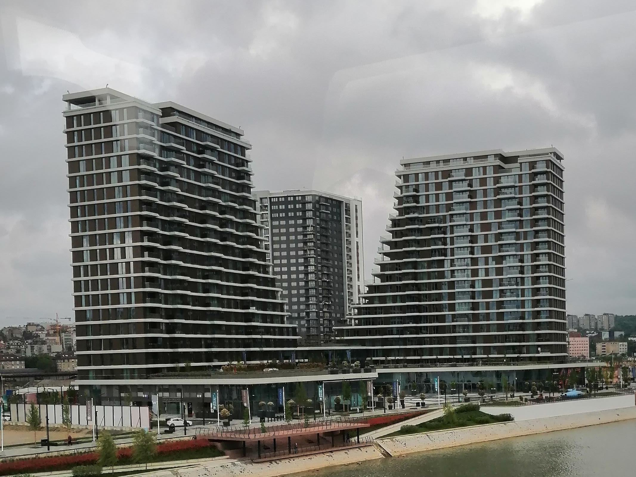 Srpski (latinica): Beograd na vodi